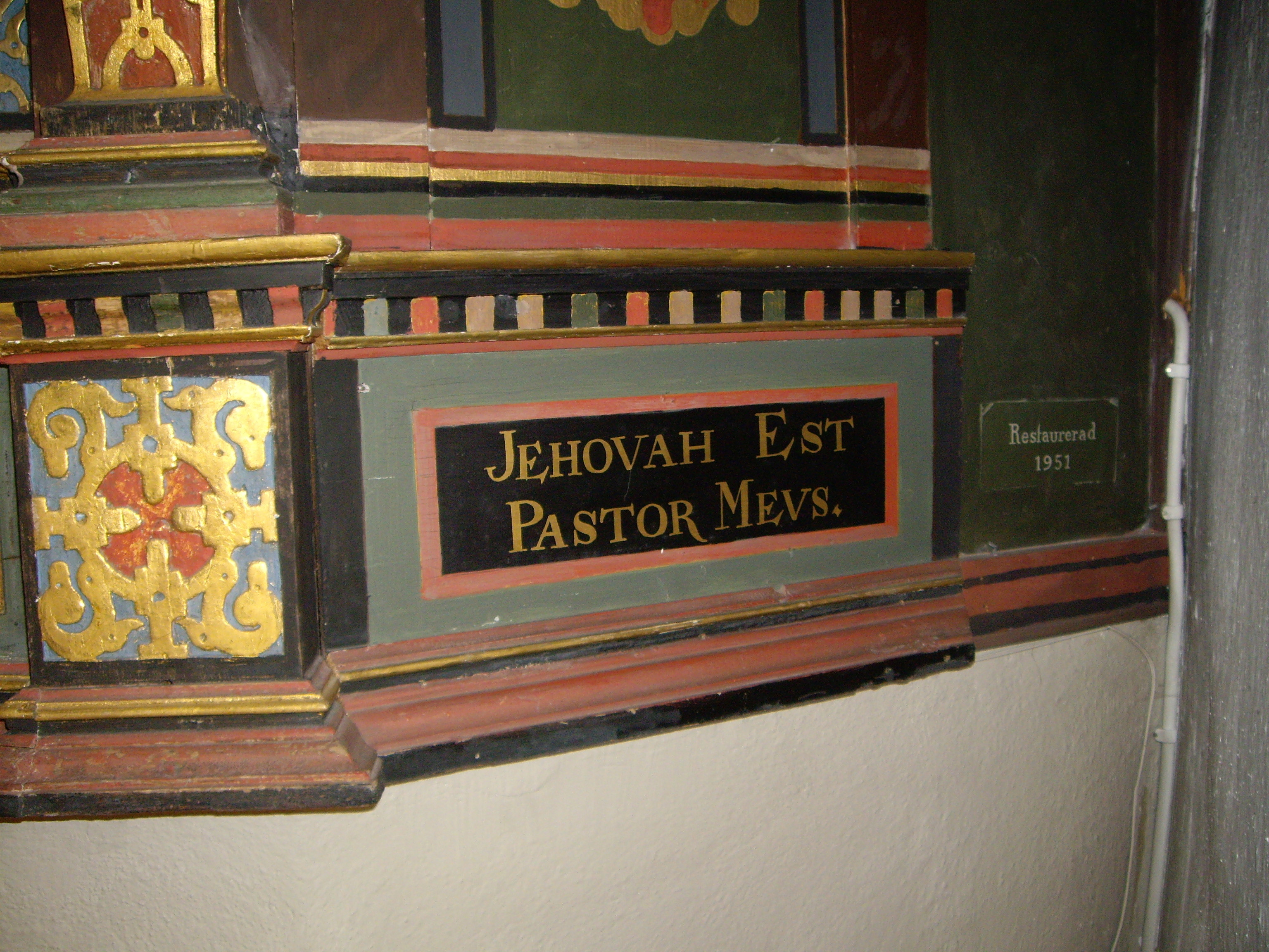 Predikstol med latinsk text från Psalm 23:1 i Jonstorps kyrka